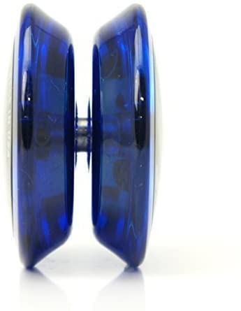 ステルスレイダー側面。ストリングプレイに向いた形状。